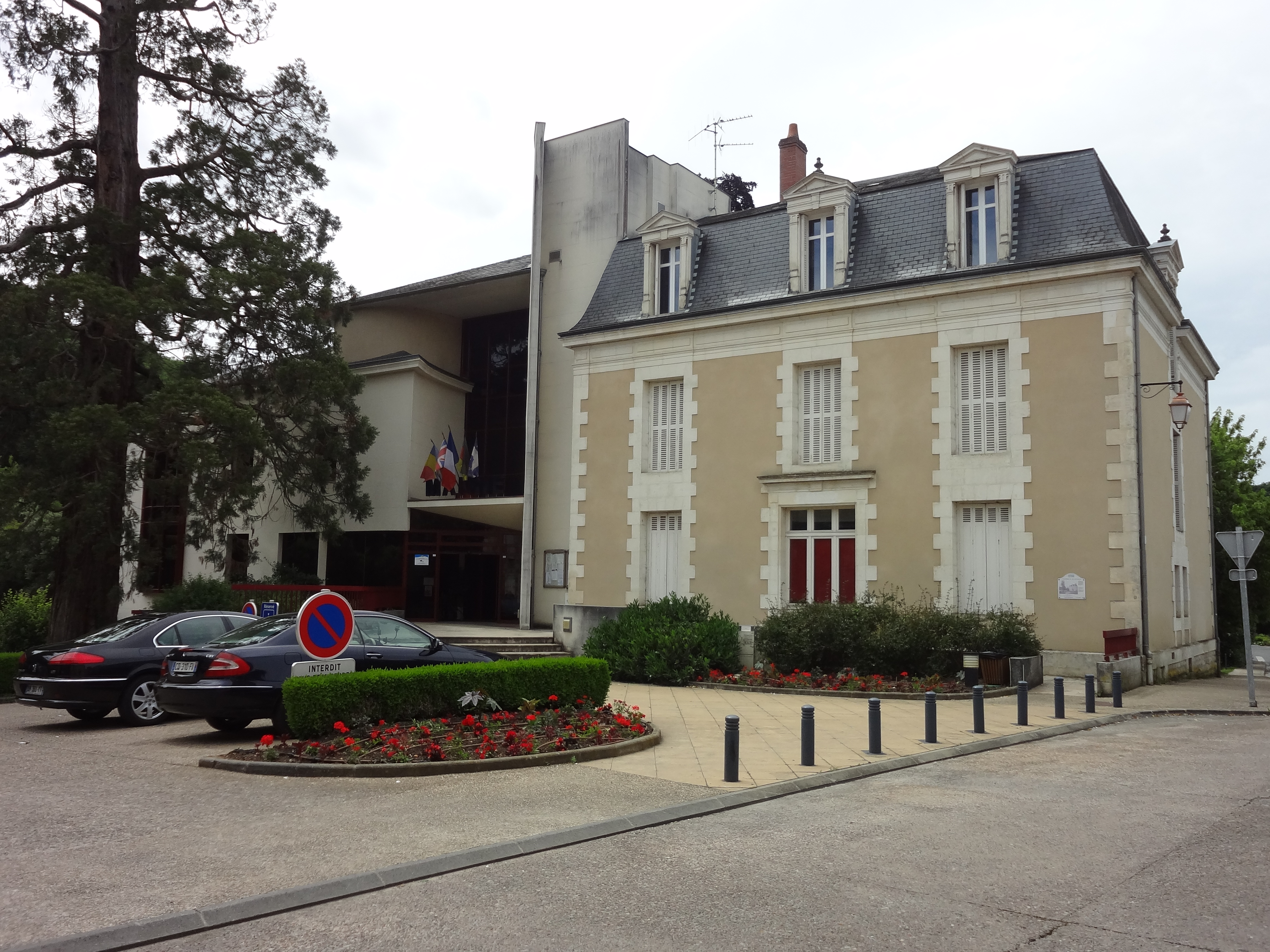 Mairie de Saint-Benoît (Vienne, France).